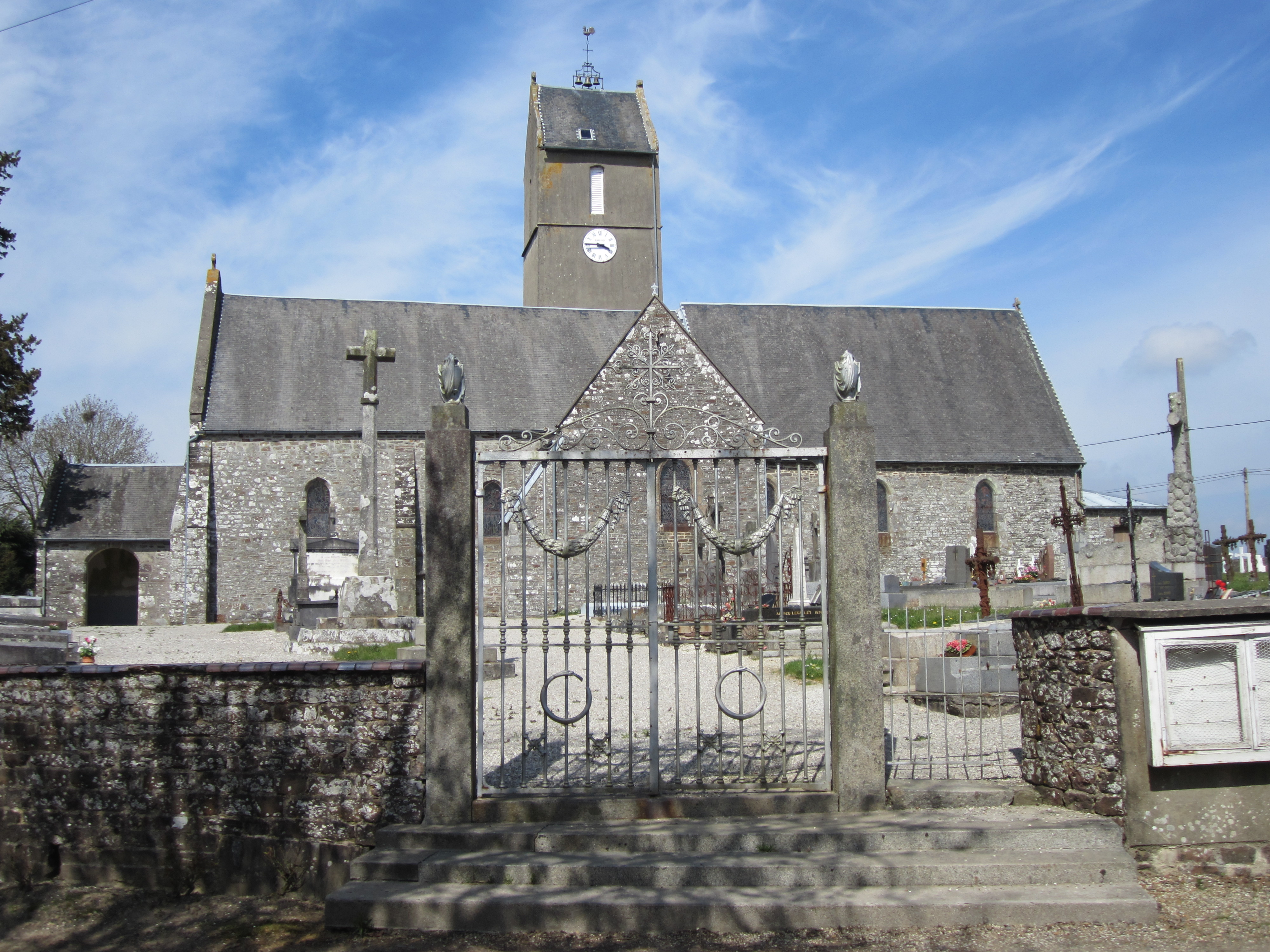 Le Mesnil-Rogues, MAnche